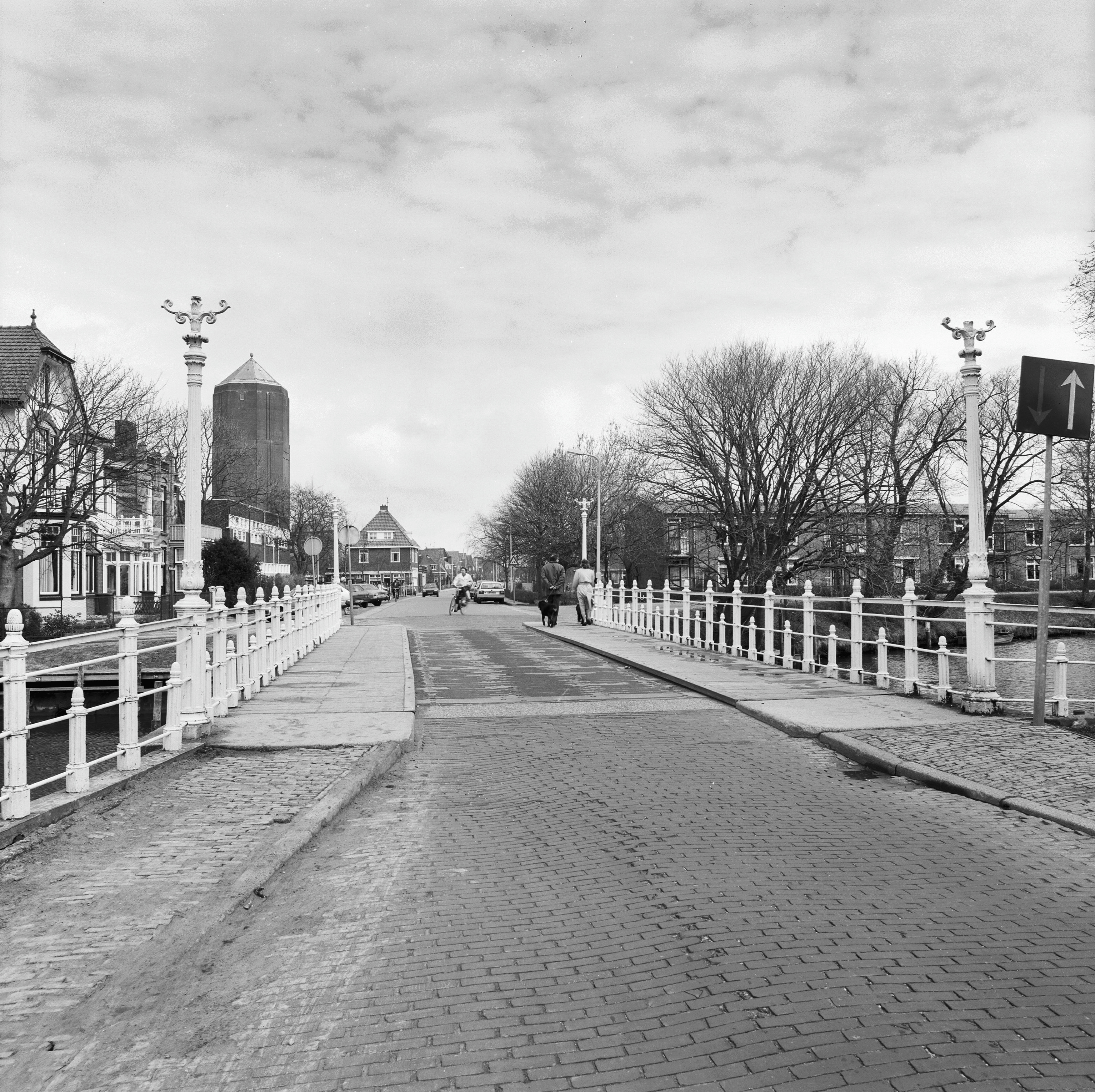 FRANEKERPOORTS BRUG: Exterieur OVERZICHT